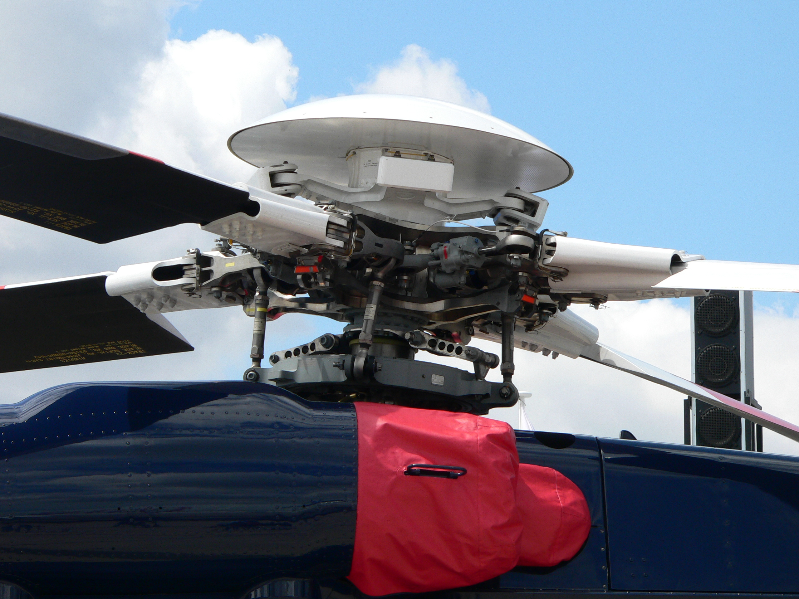 Sikorsky S-92: detail of rotor